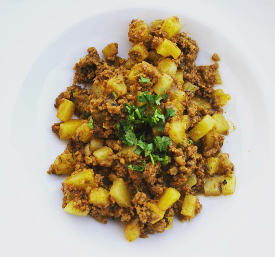 Típico picadillo de papa costarricense hecho con carne molida.